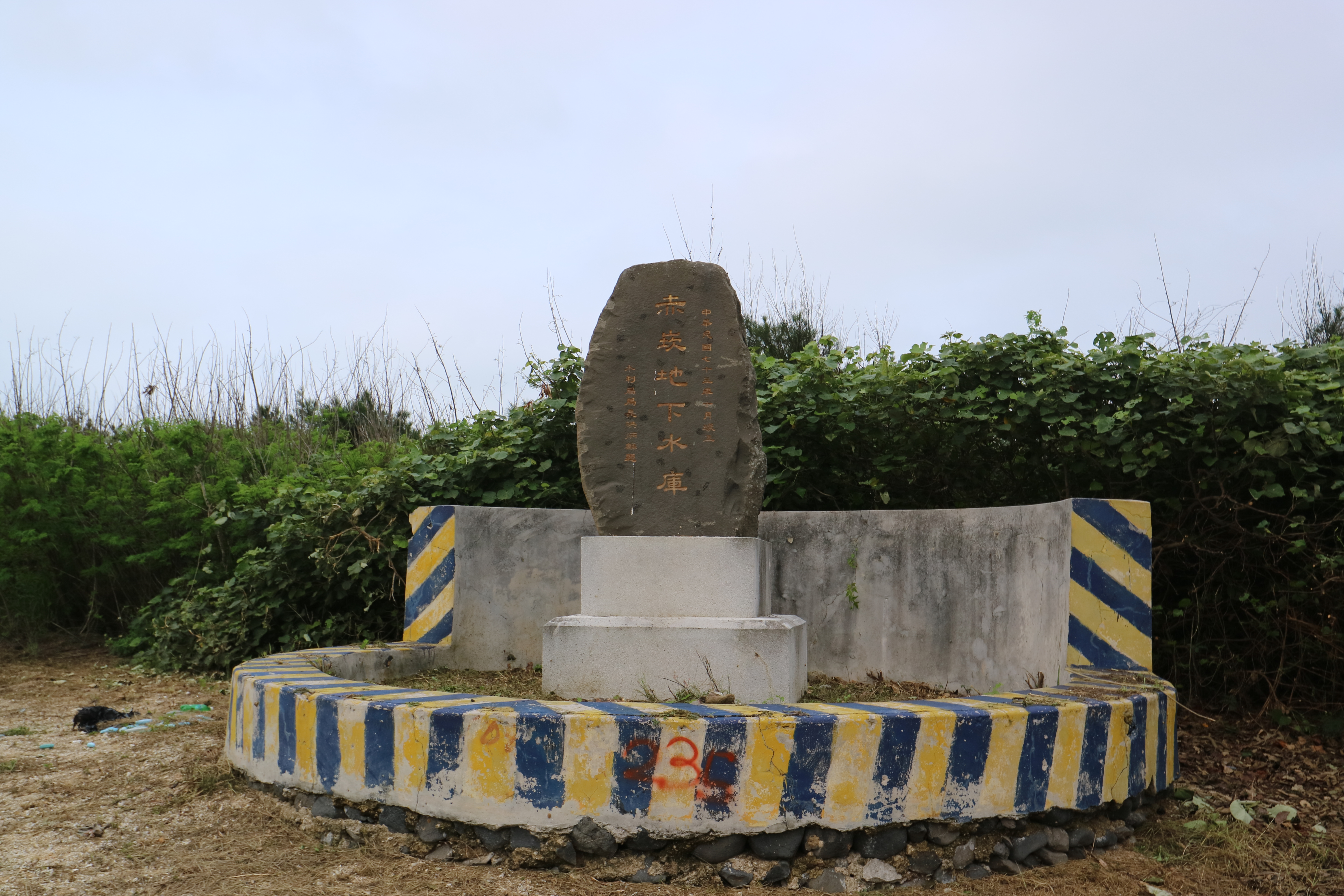 臺灣澎湖縣白沙鄉赤崁地下水庫竣工紀念碑。